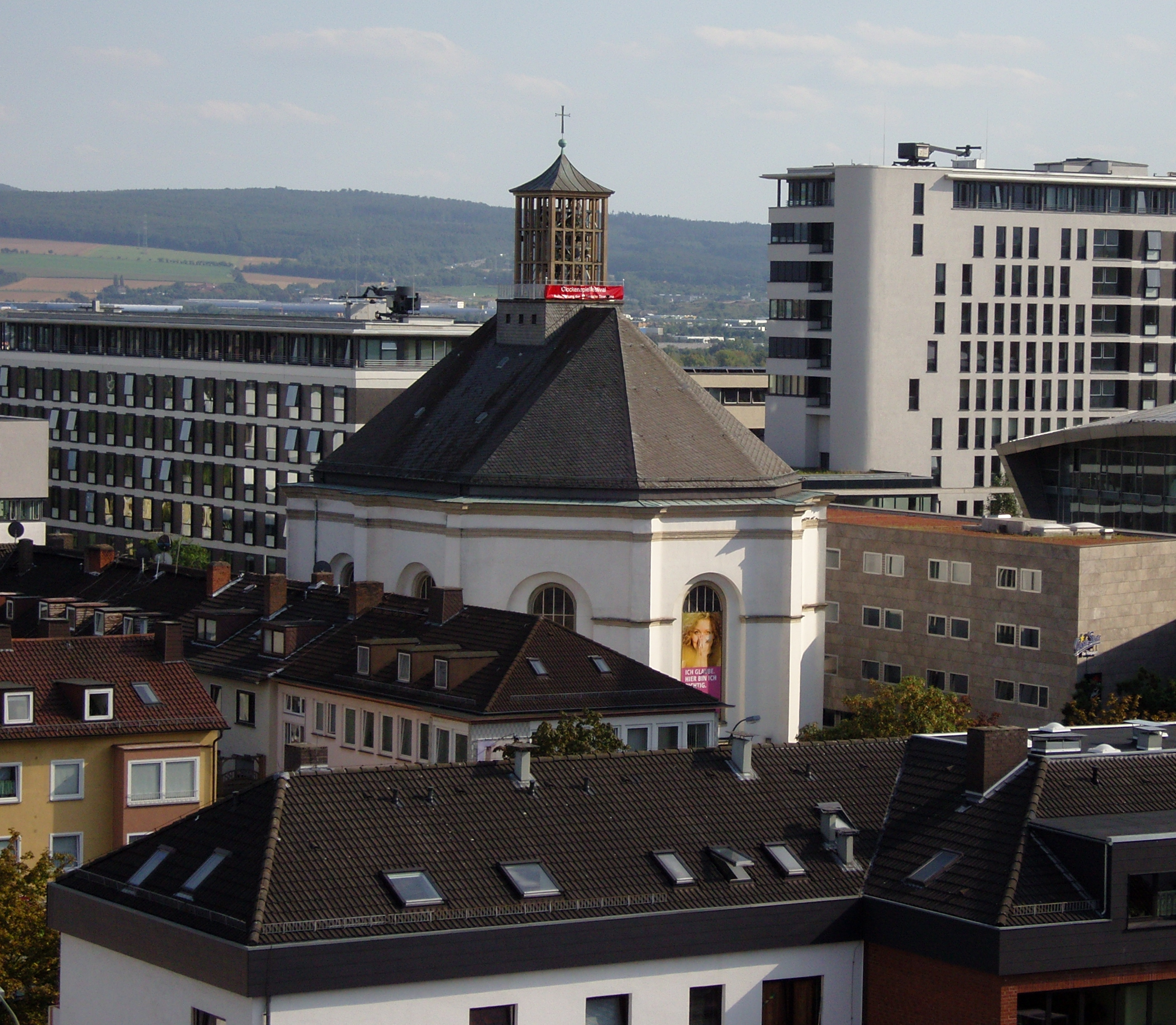 Karlskirche aufgenommen vom Parkdeck des Kaufhauses Kaufhof am Opernplatz in Kassel